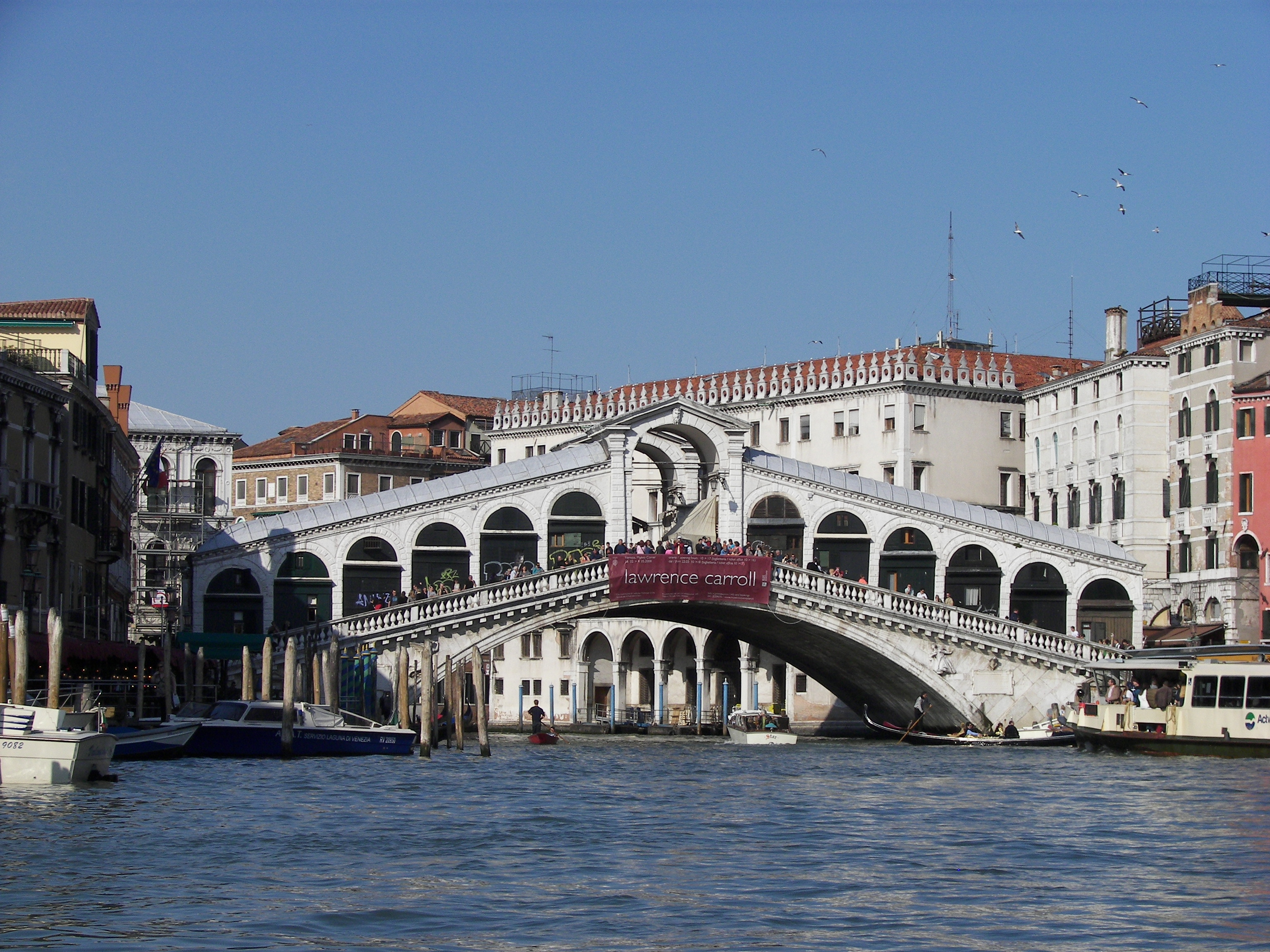 Ponte di Rialto from the Canal Grande in Venezia.